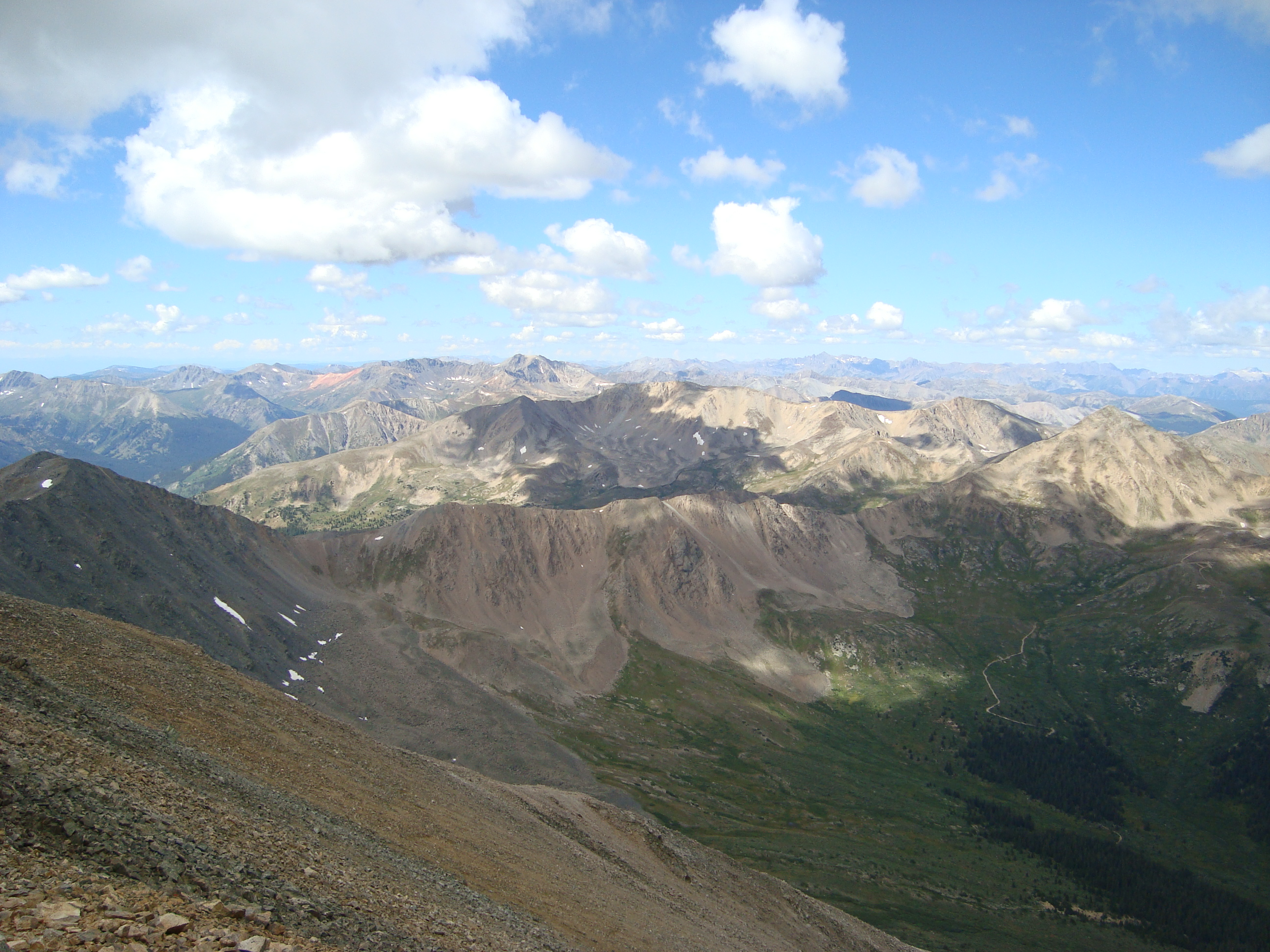 View from Mount Elbert to the west